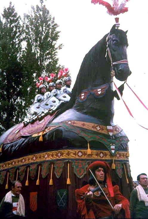 Ros beiaardommegang 1975 Gebroeders De Jonghe.